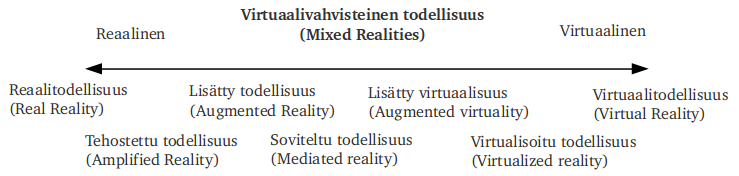 M.A. Schnabelin reaalitodellisuus - virtuaalitodellisuus- jatkumo